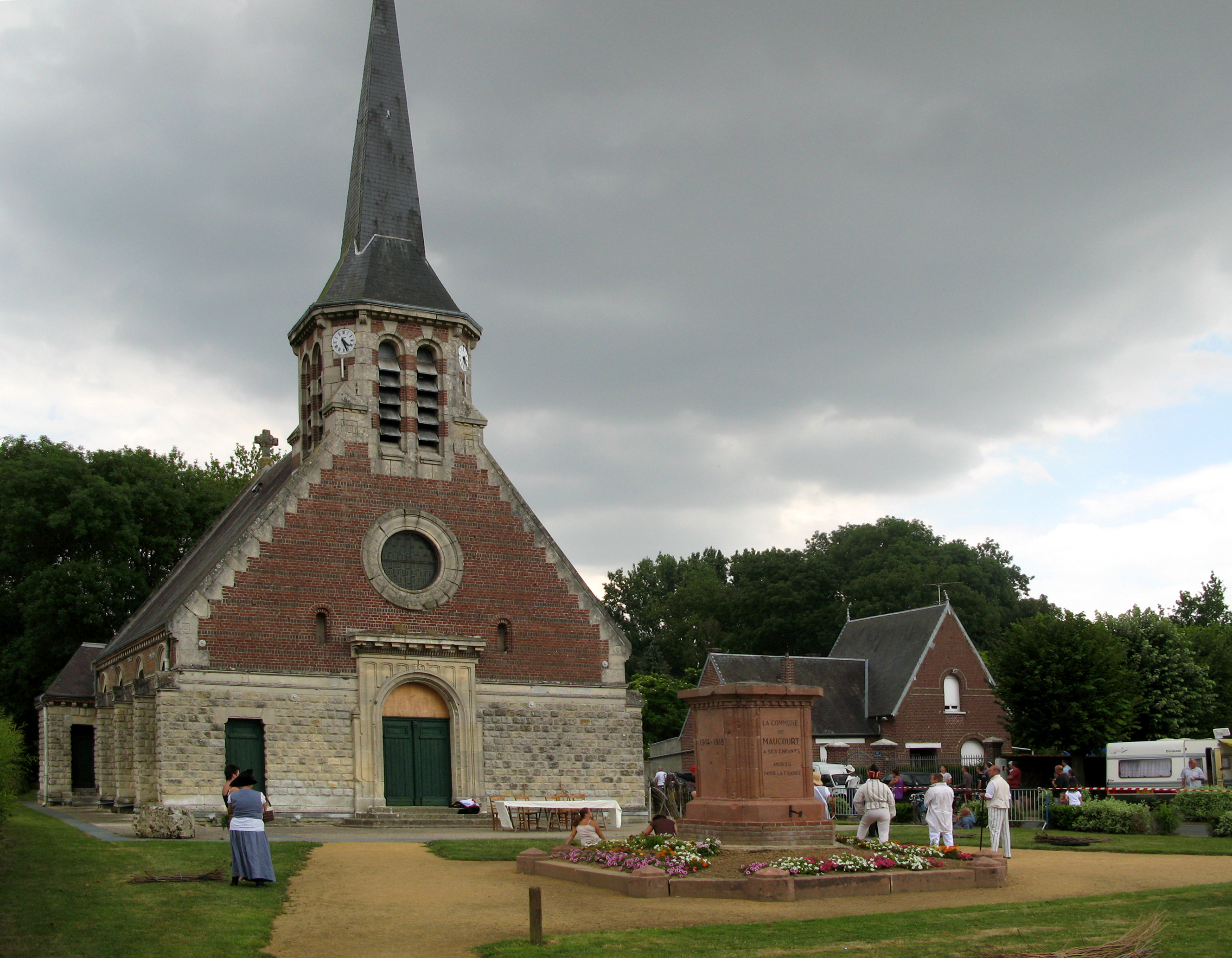 Maucourt (Somme, France) - Un bivouac napoléonien et une reconstitution historique furent organisés pour la fête communale de juillet 2010. Une répétition (le samedi en début d'après-midi) précède la première des 3 représentations prévues (une le samedi et deux le lendemain dimanche). .